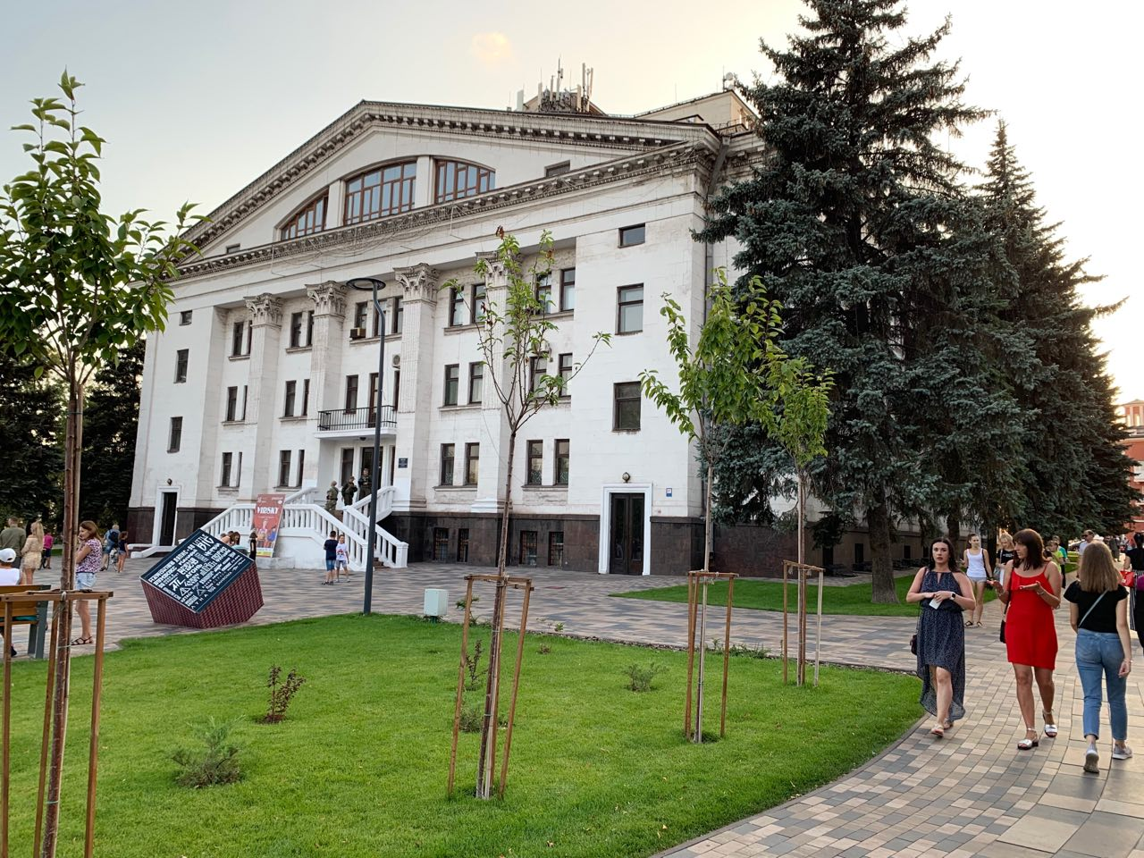 Східний фасад Драматичного театру у Маріуполі